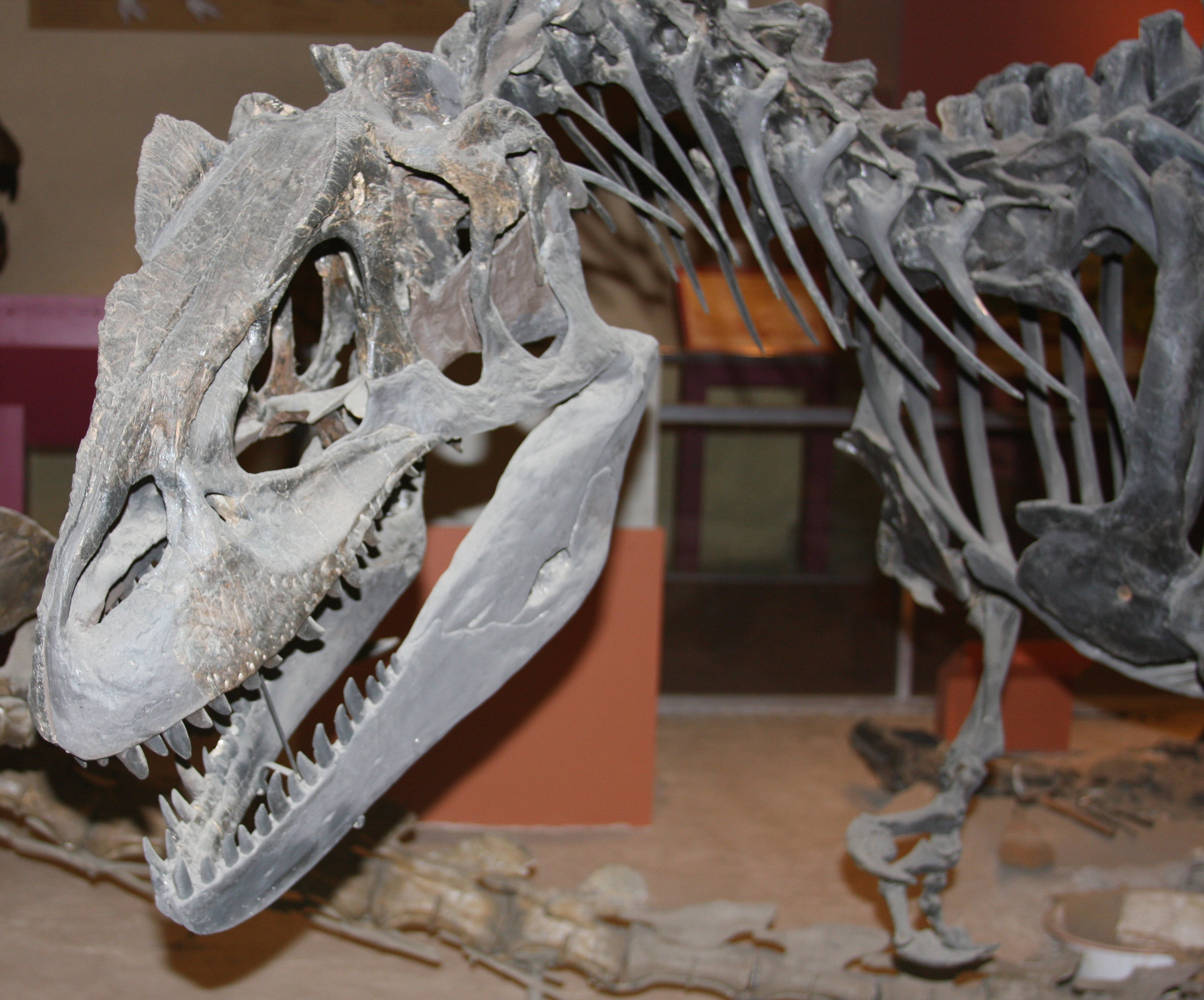 Crani d'un esquelet d'al·losaure (USNM4734) muntat al Museu Nacional d'Història Natural.